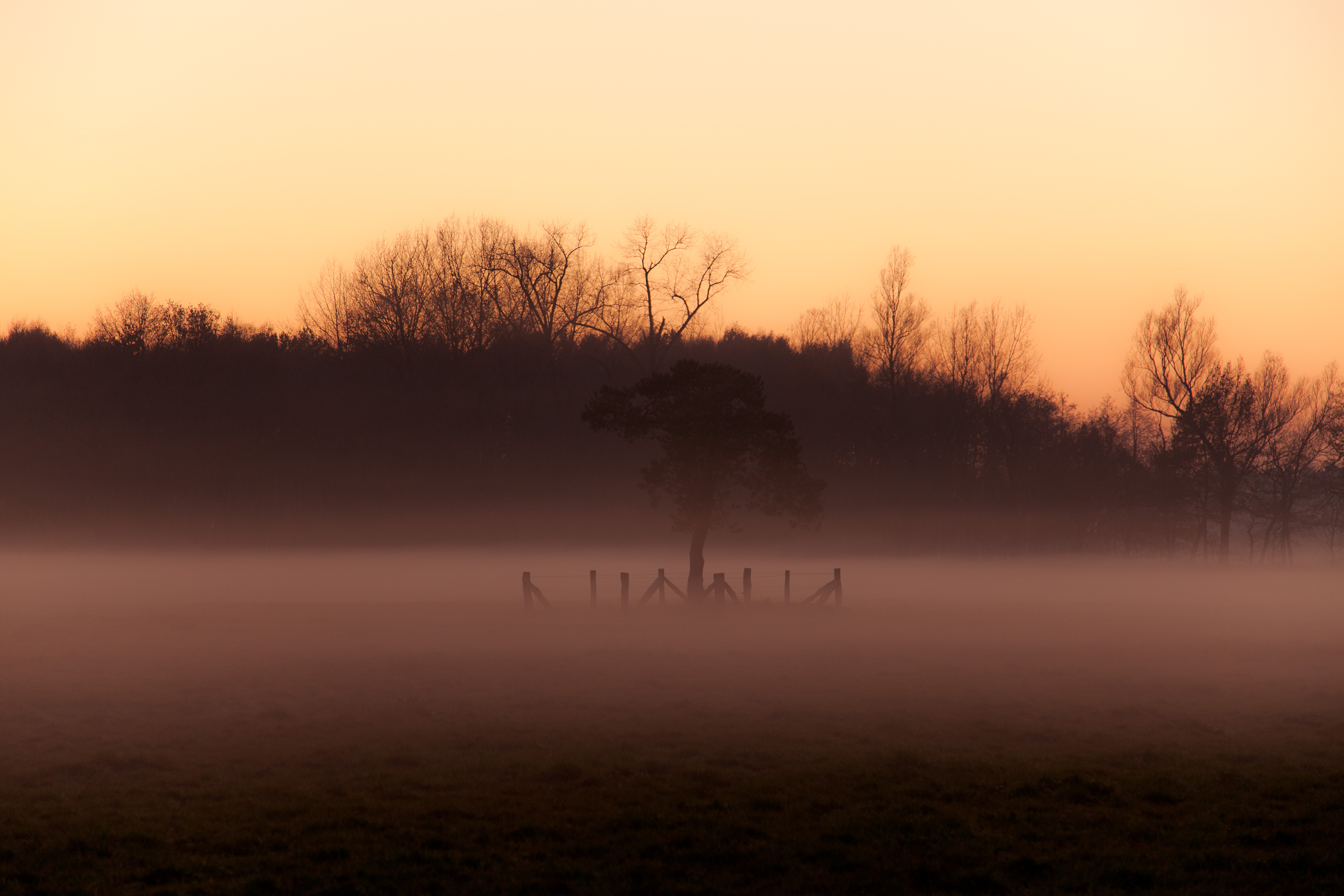 Natuurgebied Duivelshof in Overijssel, met mist.